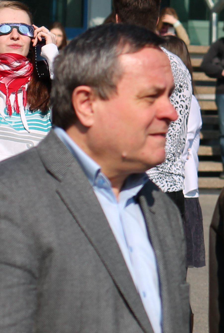 Prof. Pavel Demo během pozorování zatmění Slunce v Dejvicích 20. 3. 2015